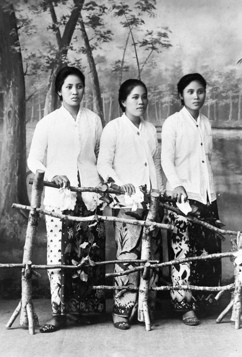 Repronegatief. Portret van drie vrouwen uit Manado, geposteerd voor een idyllische achtergrond